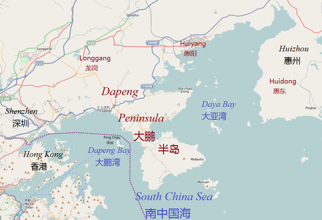 Geografie van dit gebied via